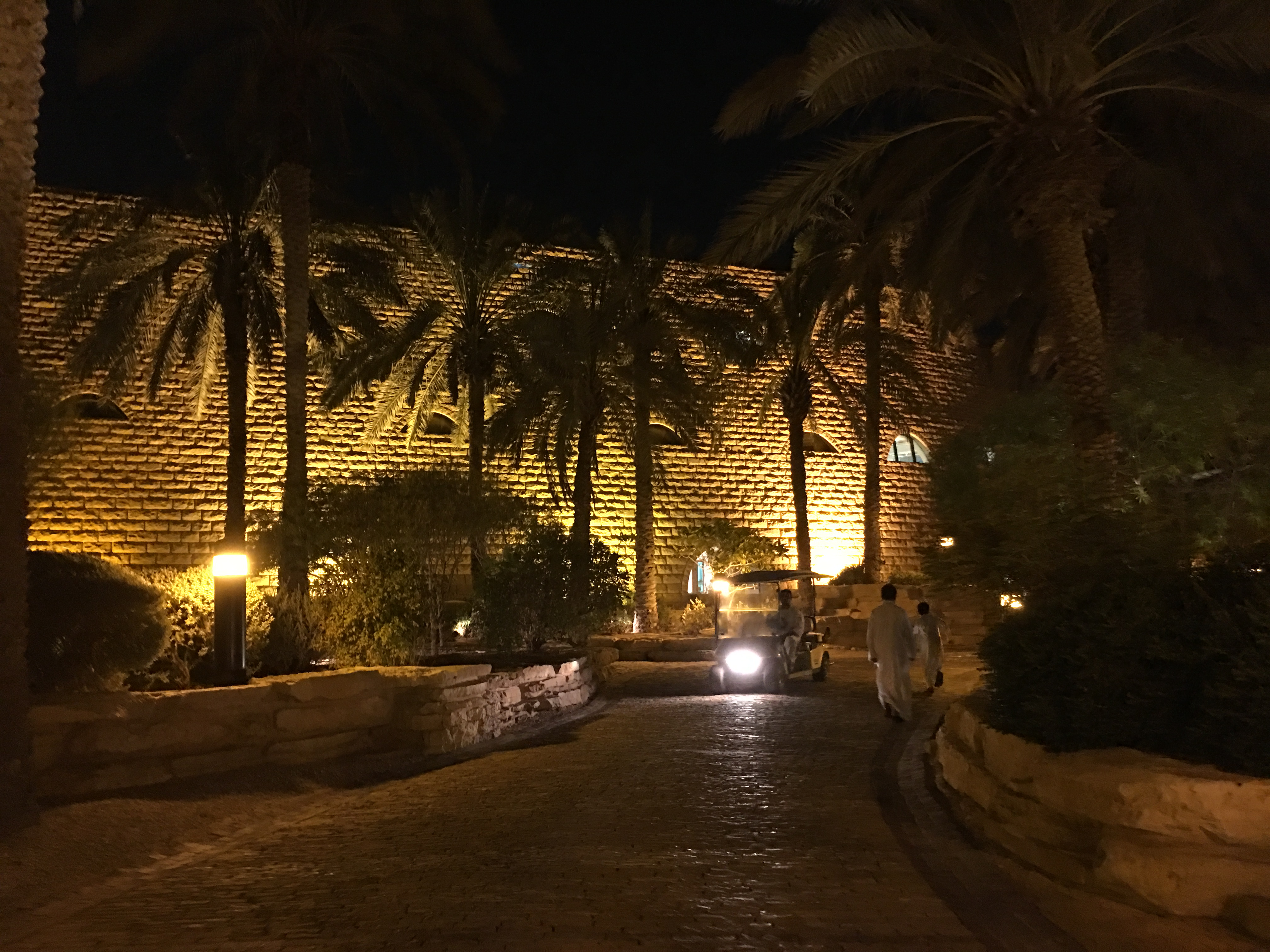 Tuwaiq Palace